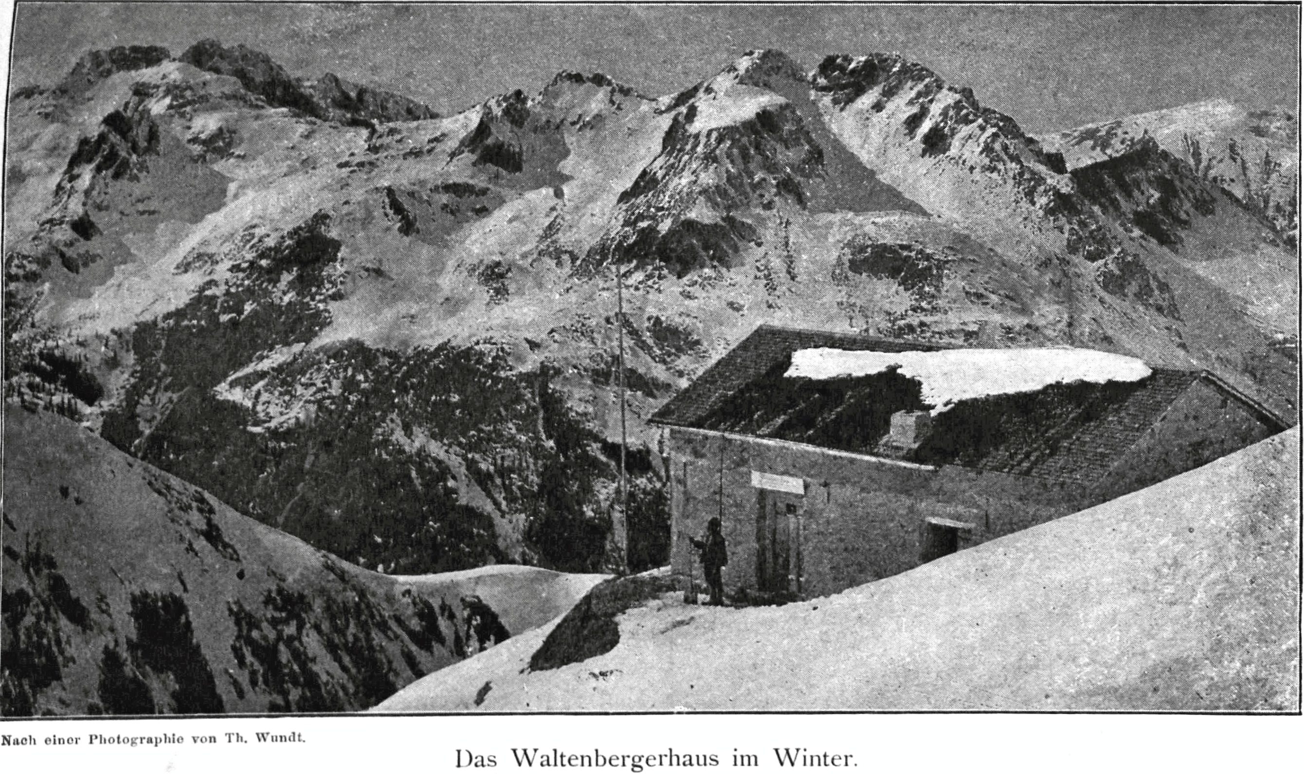 Das Waltenbergerhaus im Winter (1887) aus Zeitschrift des Deutschen und Oesterreichischen Alpenvereins 1892 Band 23